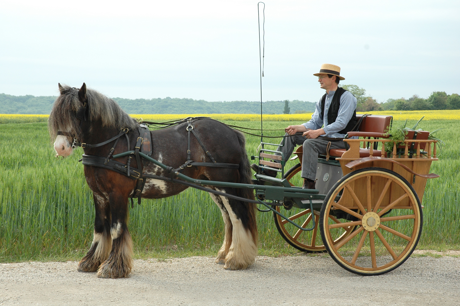 Photo d'un attelage prise lors de la rencontre "Irish cob" à Itteville (en Essonne, 91).